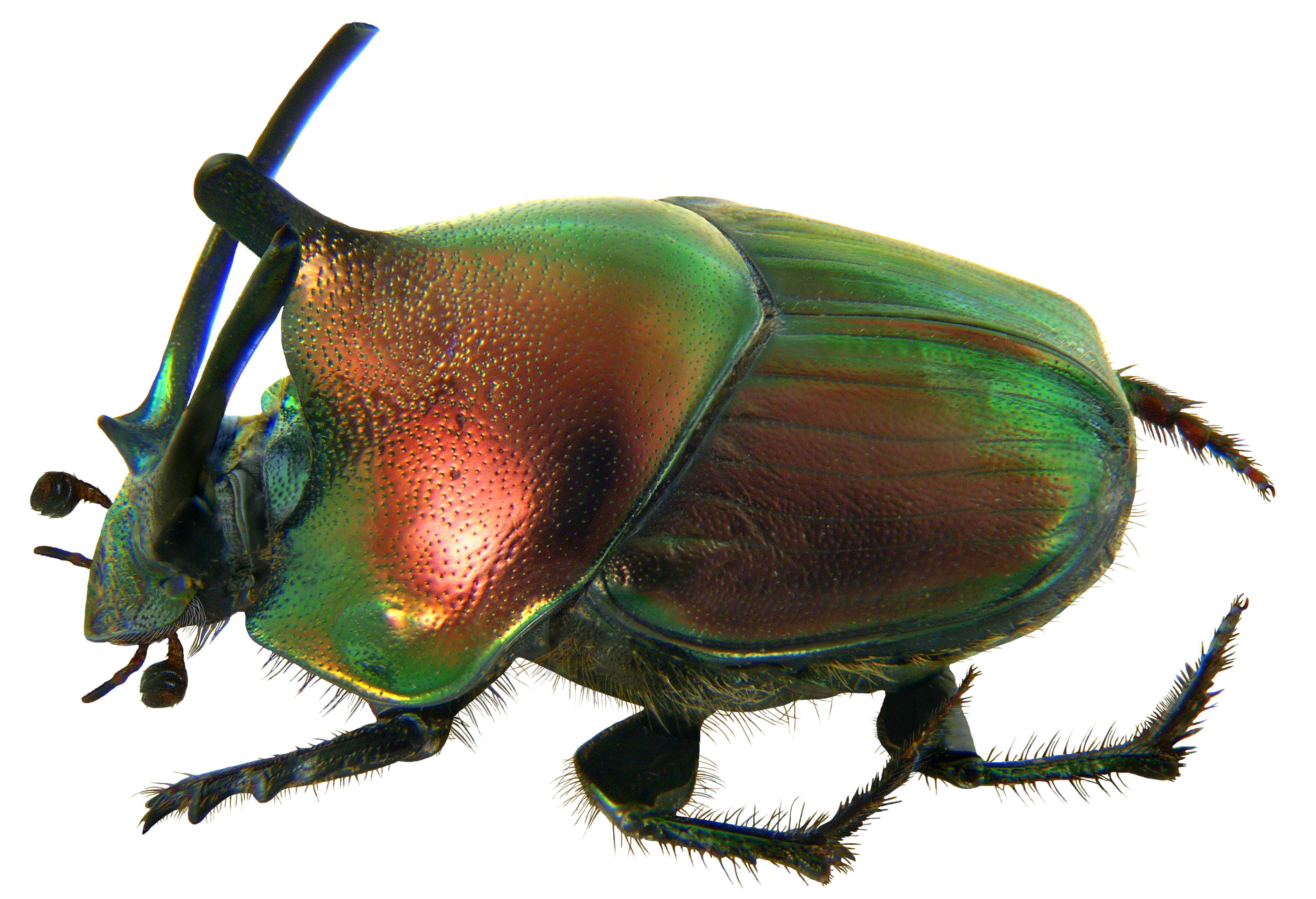 Familie: Scarabaeidae Grösse: 13 mm Fundort: Kenia, Tsavo National Park leg.det. U.Schmidt, 1992 Foto: U.Schmidt, 2009